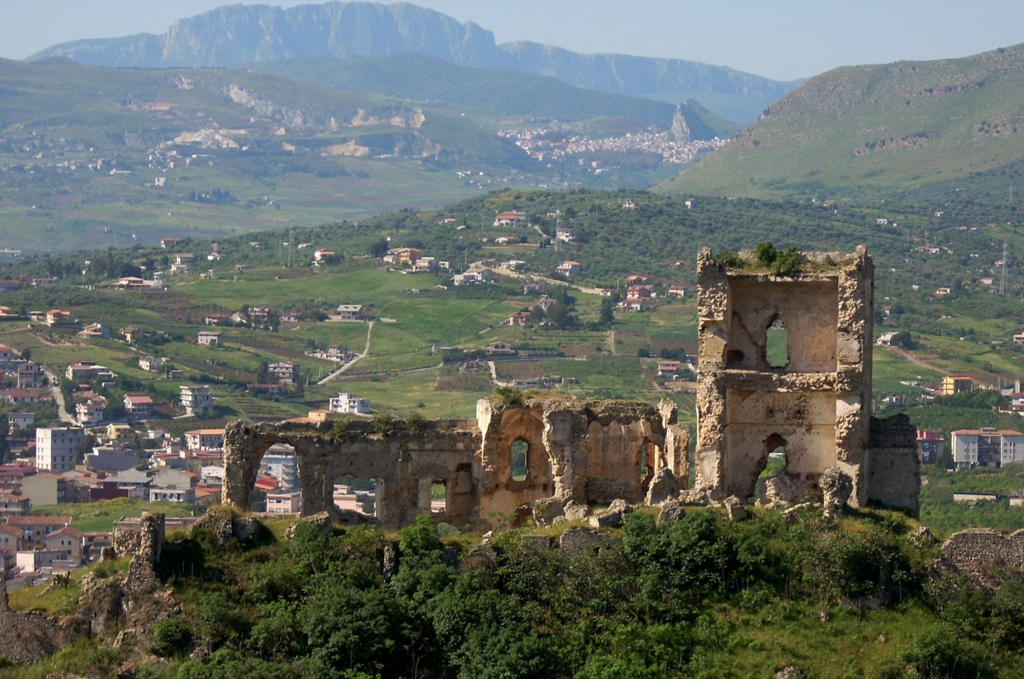 Il Castello Arabo-normanno di Rocca delle Ciavole, Il Castello di Misilmeri con sfondo "Rocca Brusambra